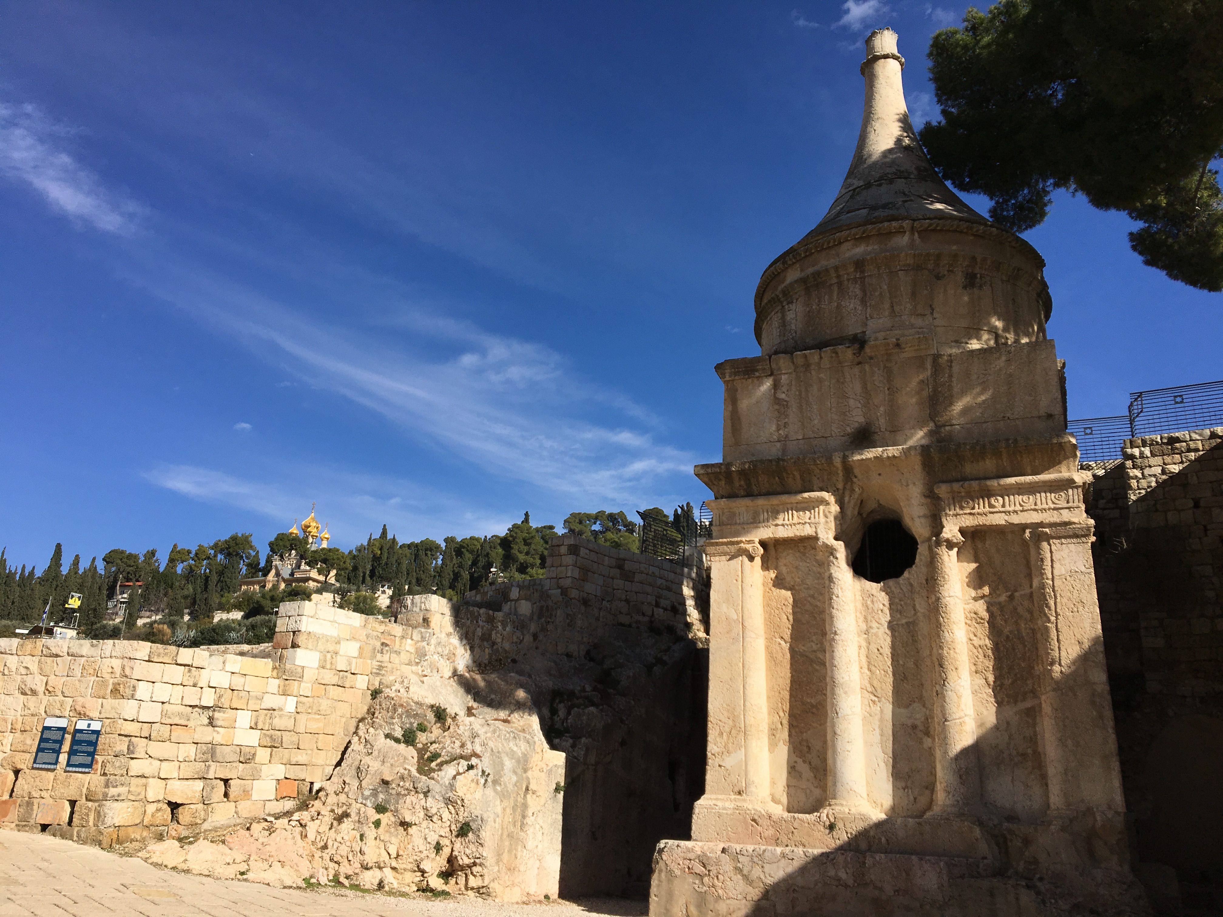 Jerusalem